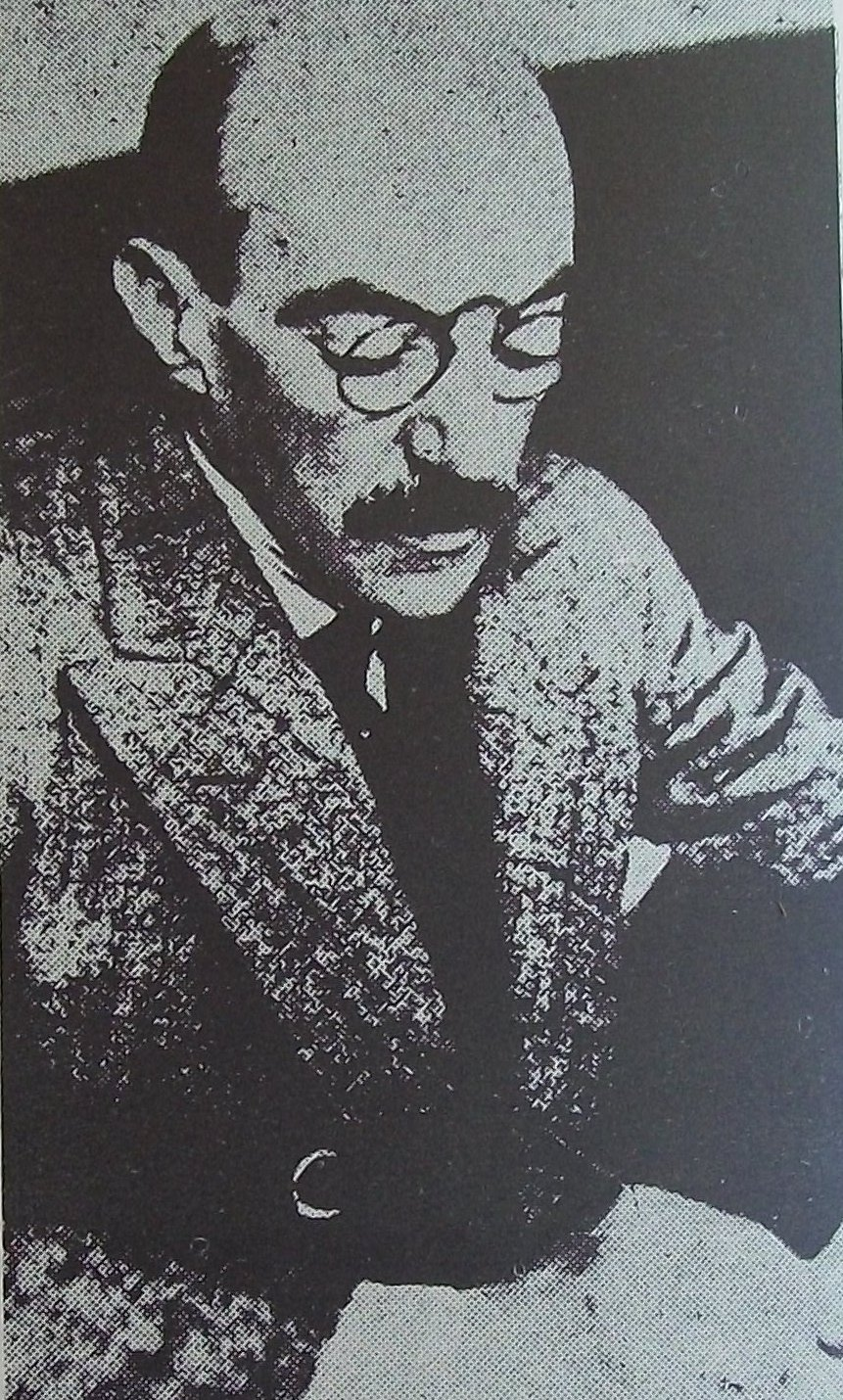 Belisario Roldán